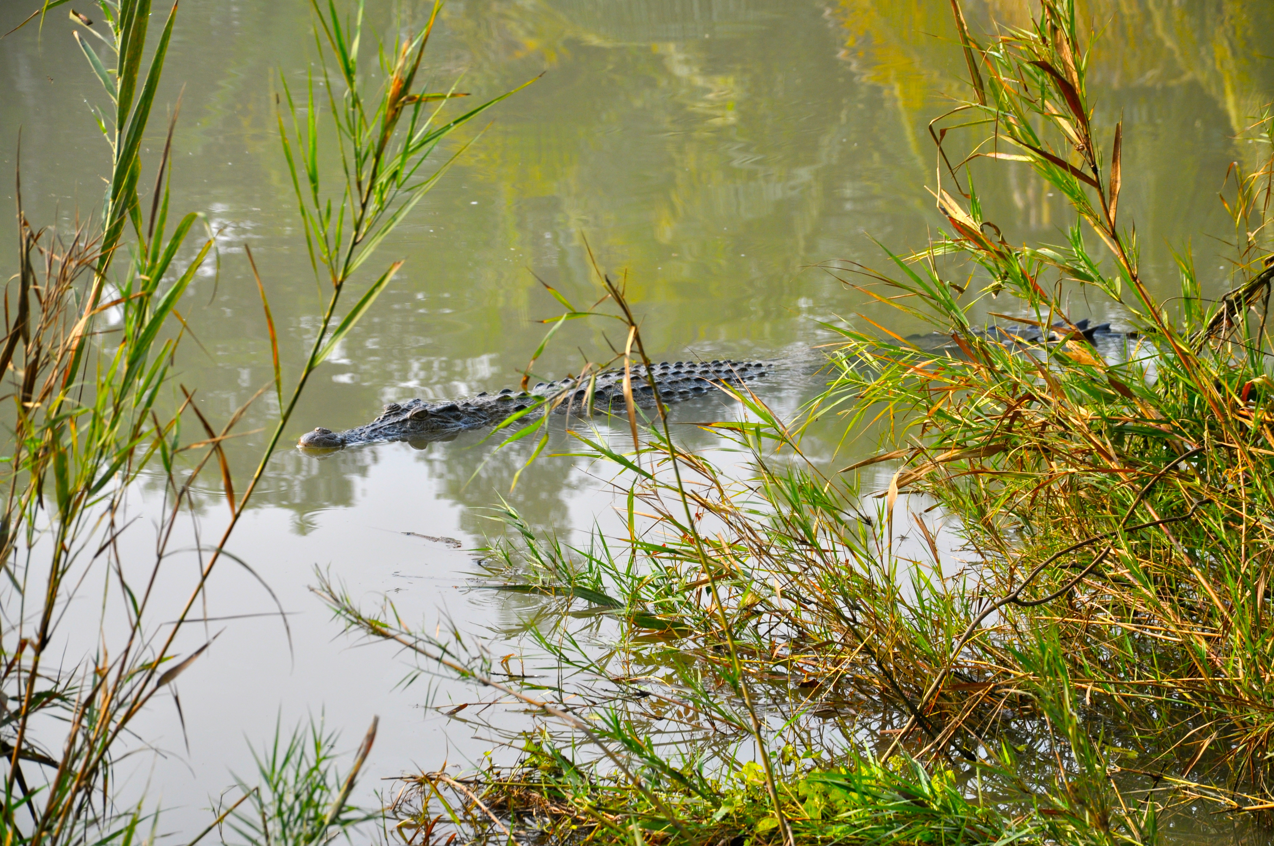 Ein Salzwasserkrokodil wartet auf Beute in den Sundarbans von Bangladesch